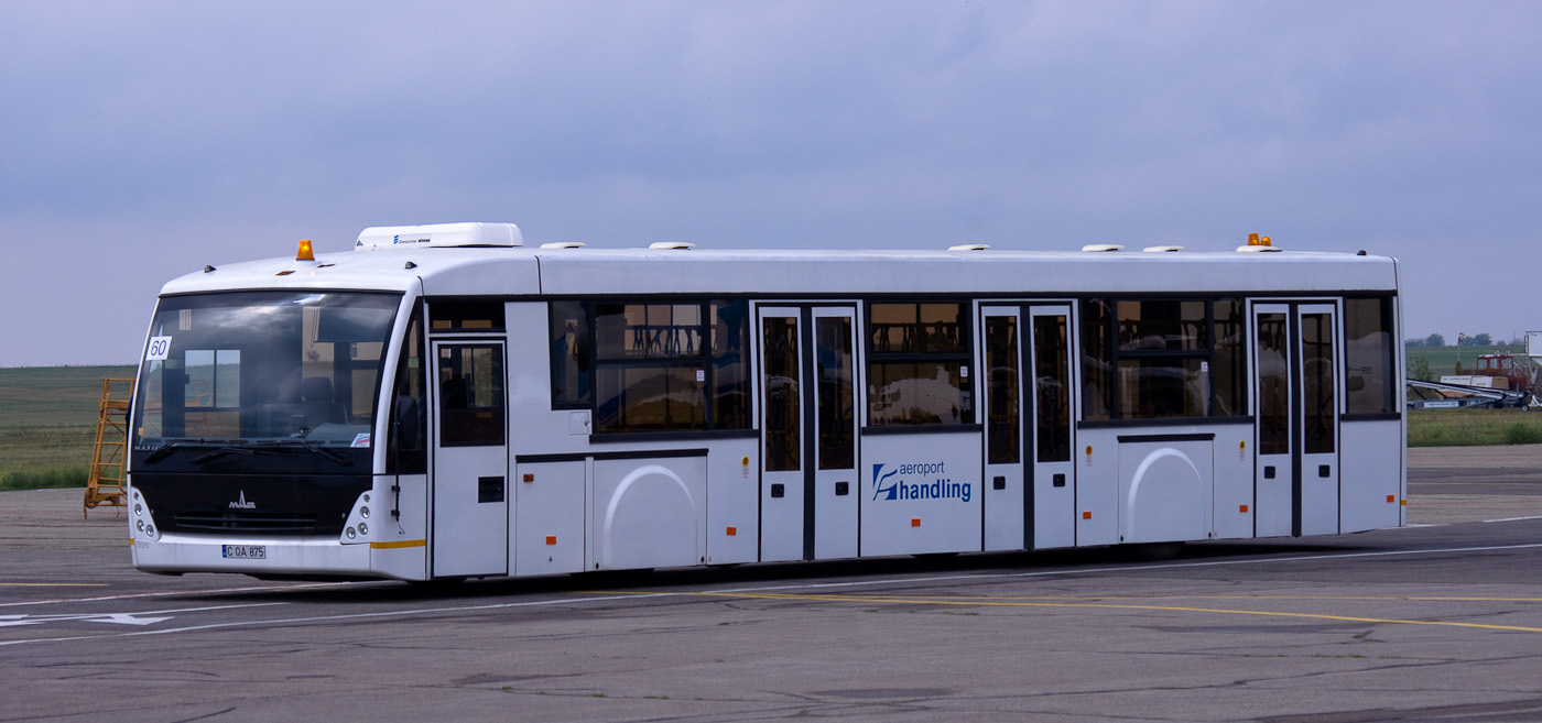 День открытых дверей в аэропорту Кишинёва. Суббота.